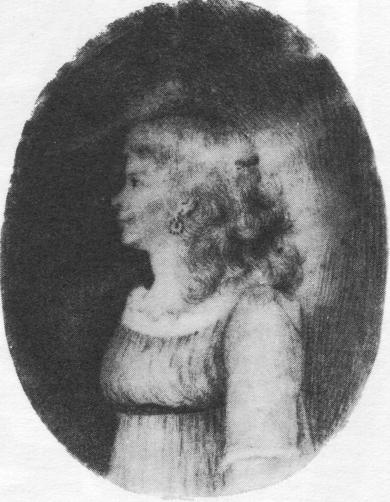 Selbstporträt, Bleistiftzeichnung auf Elfenbein (ohne Jahr), Größe des Medaillons: ca. 6,4 cm hoch und 5 cm breit, Marbach, Deutsches Literaturarchiv